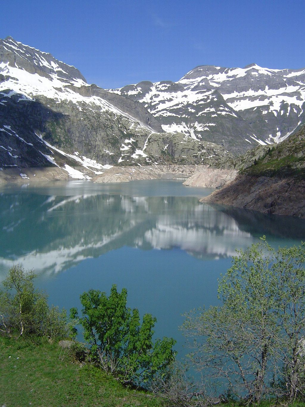 Der Lac d'Emosson, das Ausflugsziel am oberen Ende des "Parc d'Attractions du Châtelard". Ganz im Hintergrund ist die Krone der alten Staumauer "Barberine" zu erkennen, welche in diesem grösseren Stausee liegt und jeweils bei Vollstau unter dem Wasser verschwindet. Aufnahme vom 22.06.2008. Bild: Thomas Brändle, Schweiz